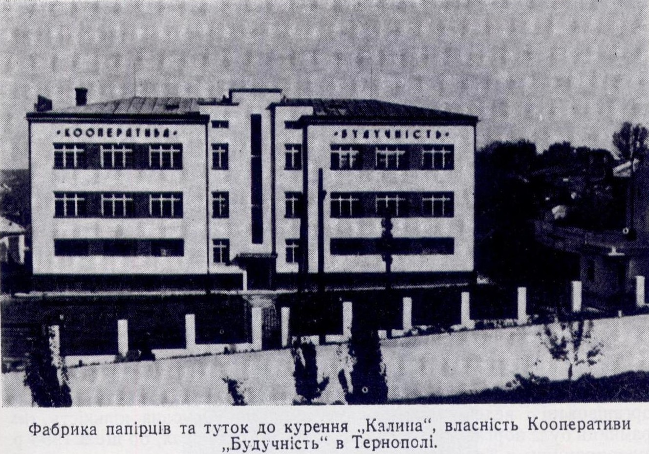 кооператива Будучність, фабрика Калина, тернопіль